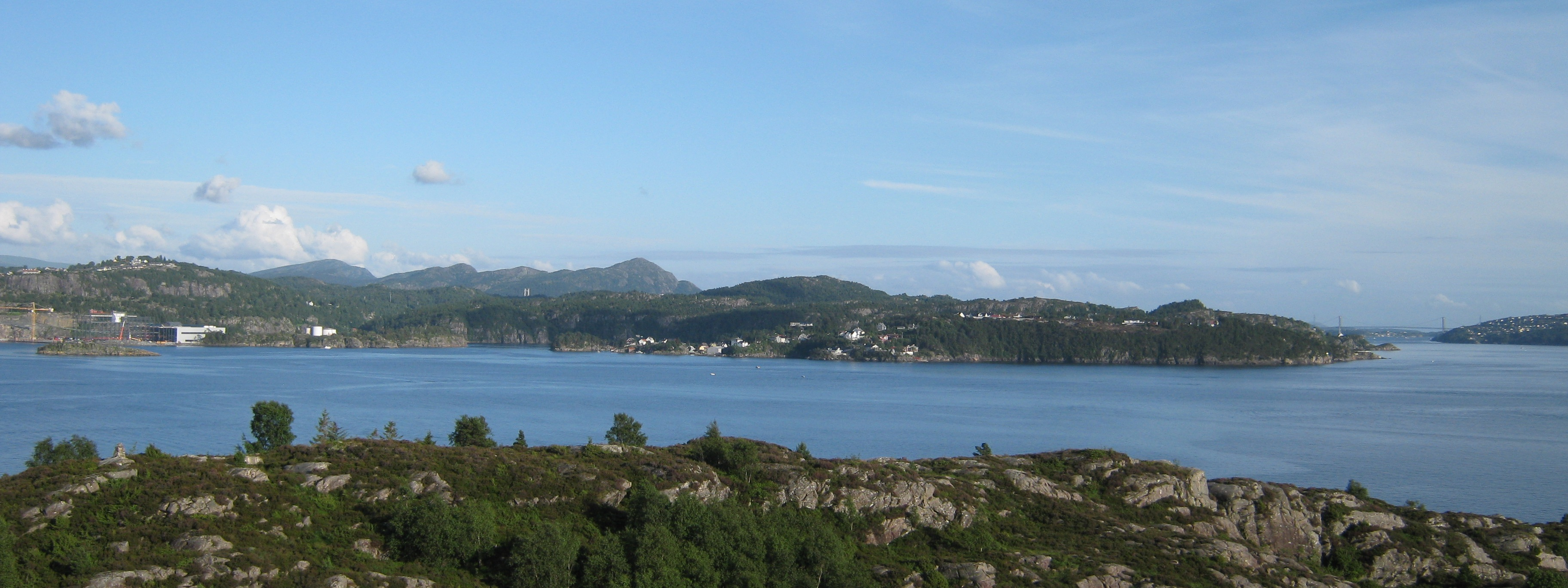 Hauglandsosen ved Askøy.